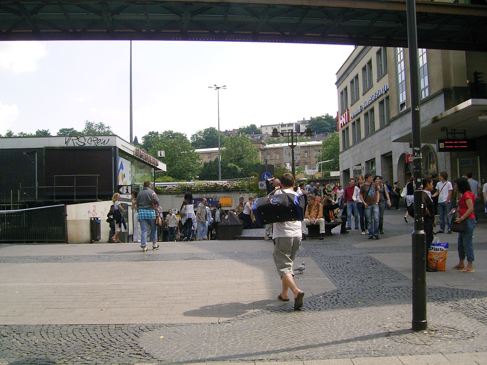 Wupperbrücke Alte Freiheit in Wuppertal